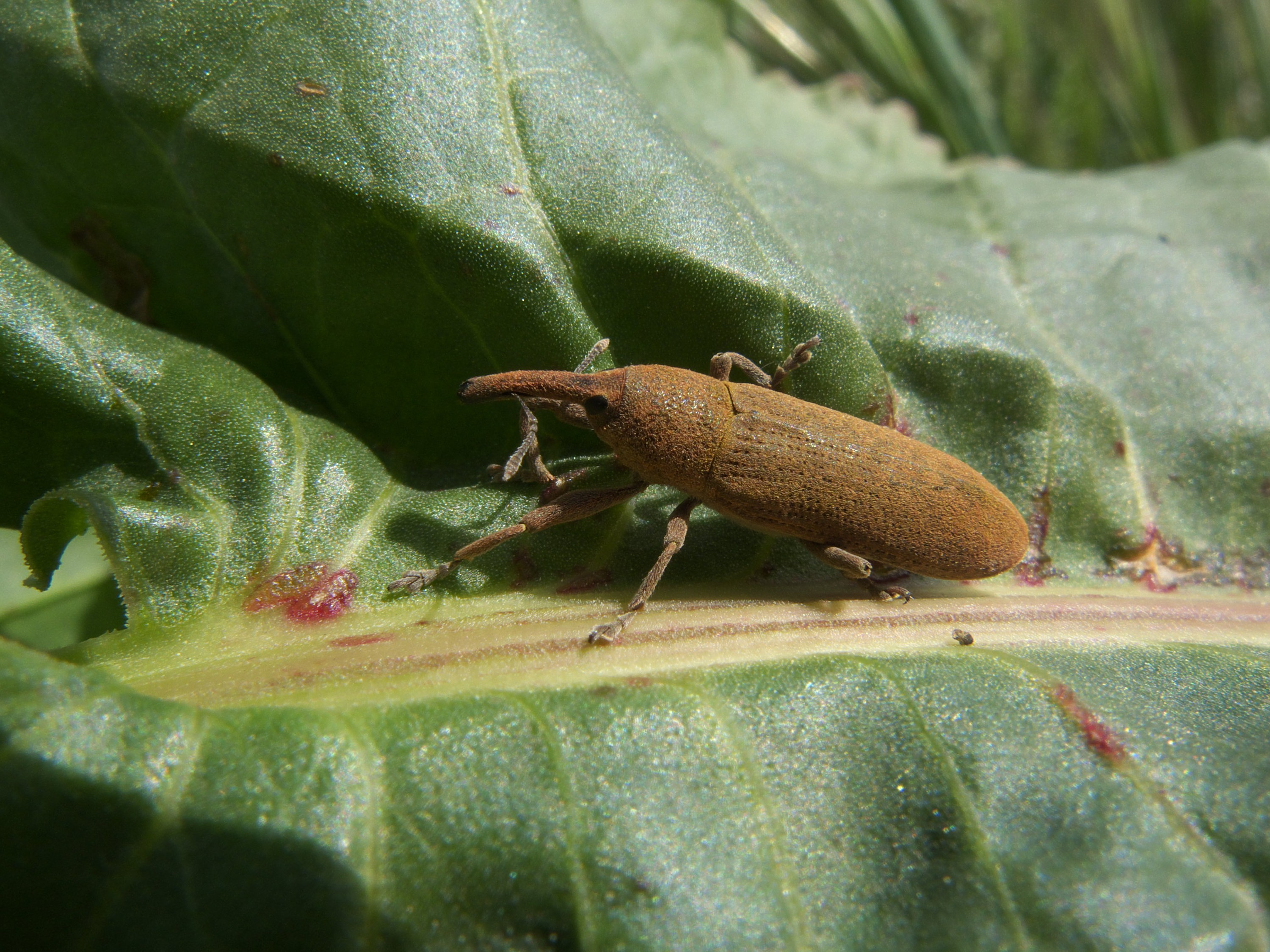 Curculiónido indeterminado sobre una hoja de Rumex. Rivas Vaciamadrid, Madrid, España.